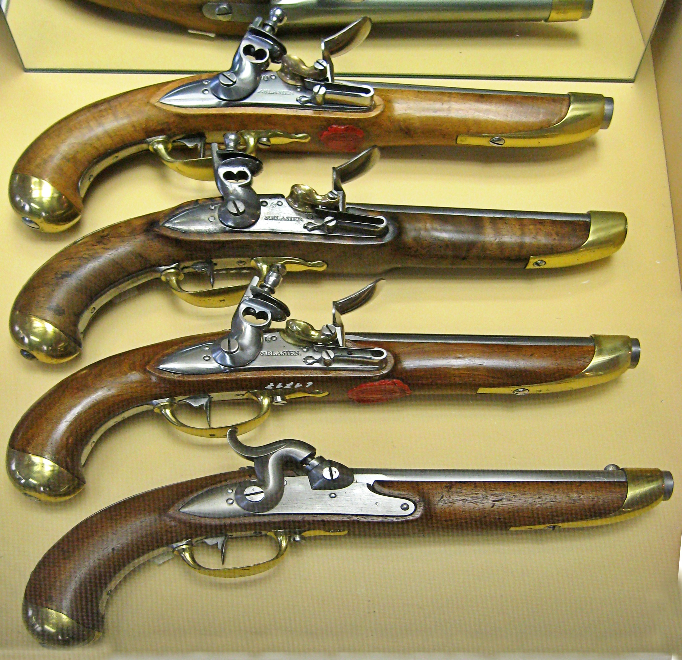 Waffenproduktion in Sankt Blasien